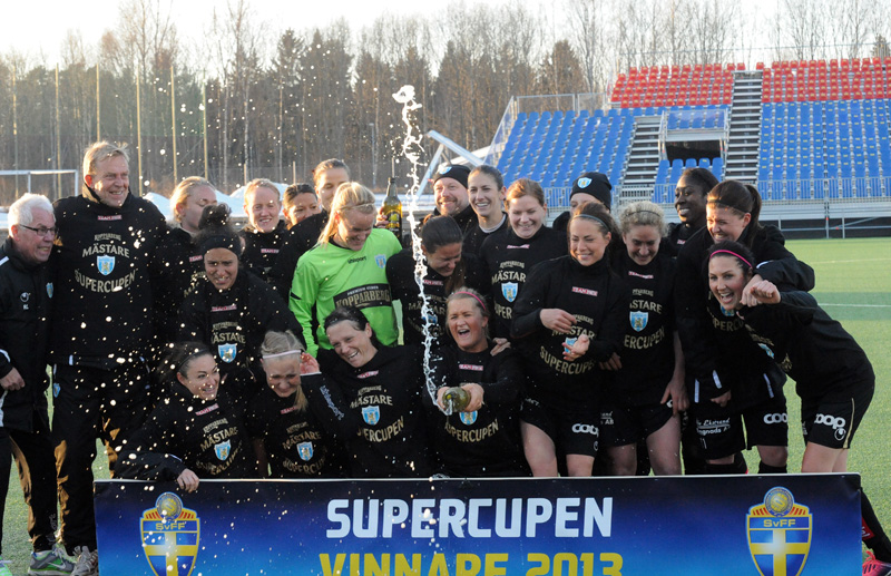 Kopparbergs/Göteborg FC celebrate winning the Svenska Supercupen in April 2013